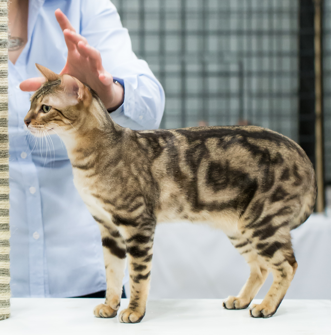 Bengal mâle présenté en exposition féline à Helsinki. Couleur : Brown marbled tabby burmese point Code FIFé :GIP Kattiklaanin Luke Catwalker [BEN n 22 31]